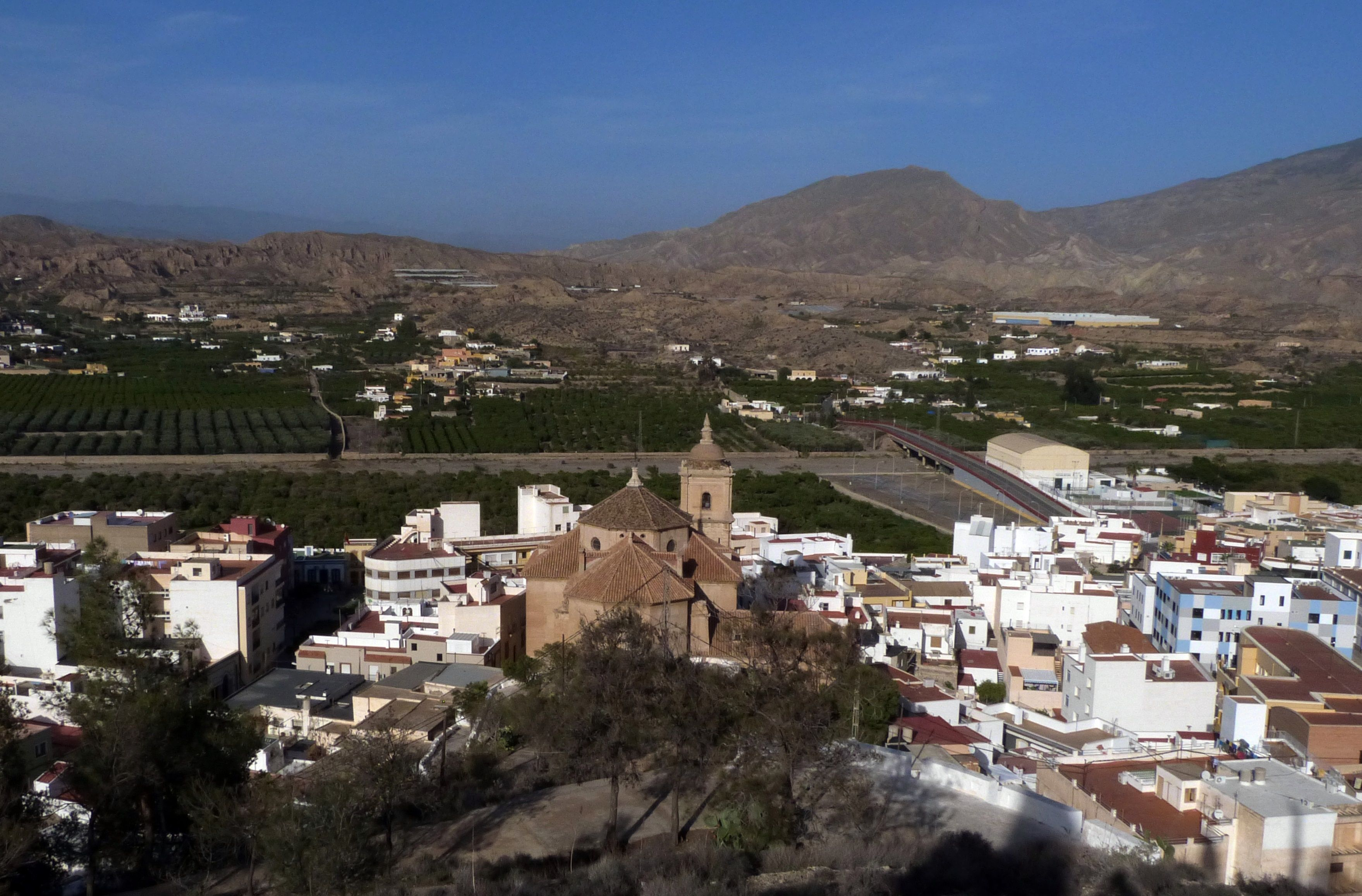 Südansicht von Gádor